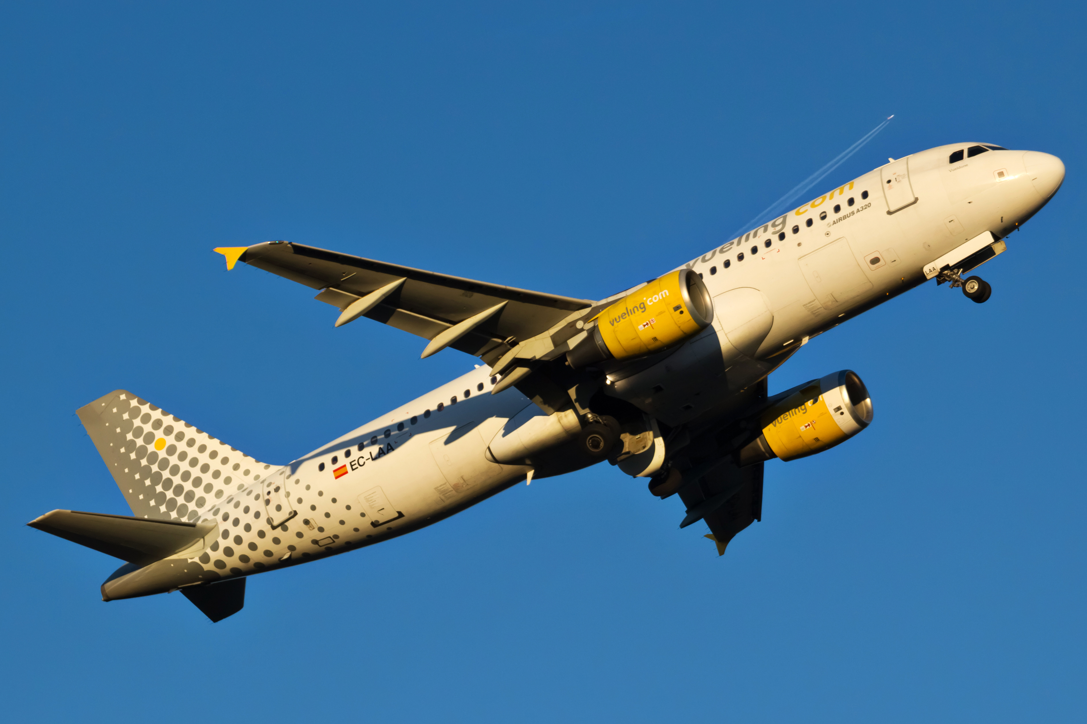 Airbus A320 de Vueling despegando do aeroporto de Santiago de Compostela.